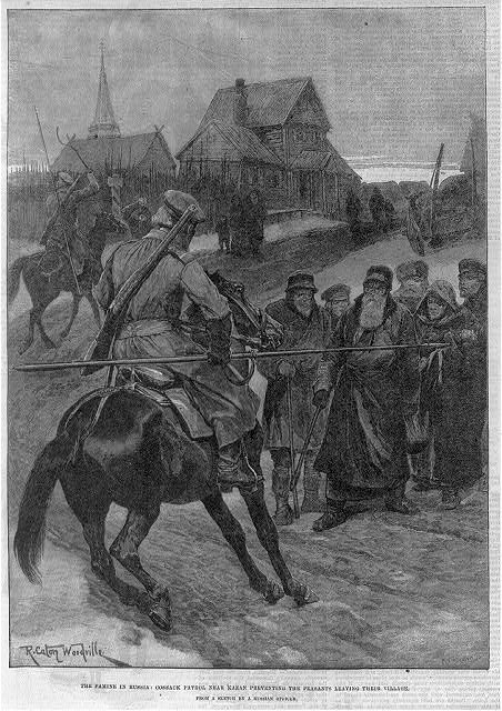 Cosaco cerca de Kazán impidiendo a los campesinos abandonar su aldea durante la hambruna de 1892.